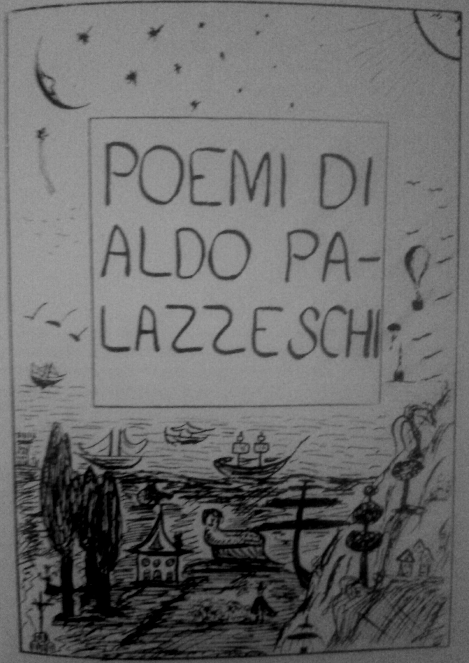 Cover of the book "Poemi" by Aldo Palazzeschi, first edition, pubblished in 1909